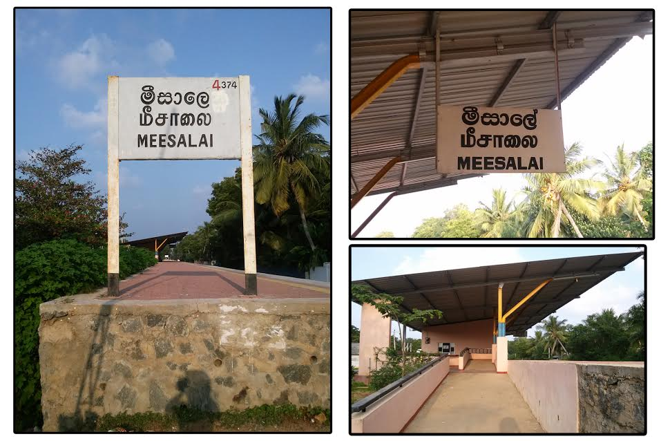 மீசாலை புகையிரத நிலையம்